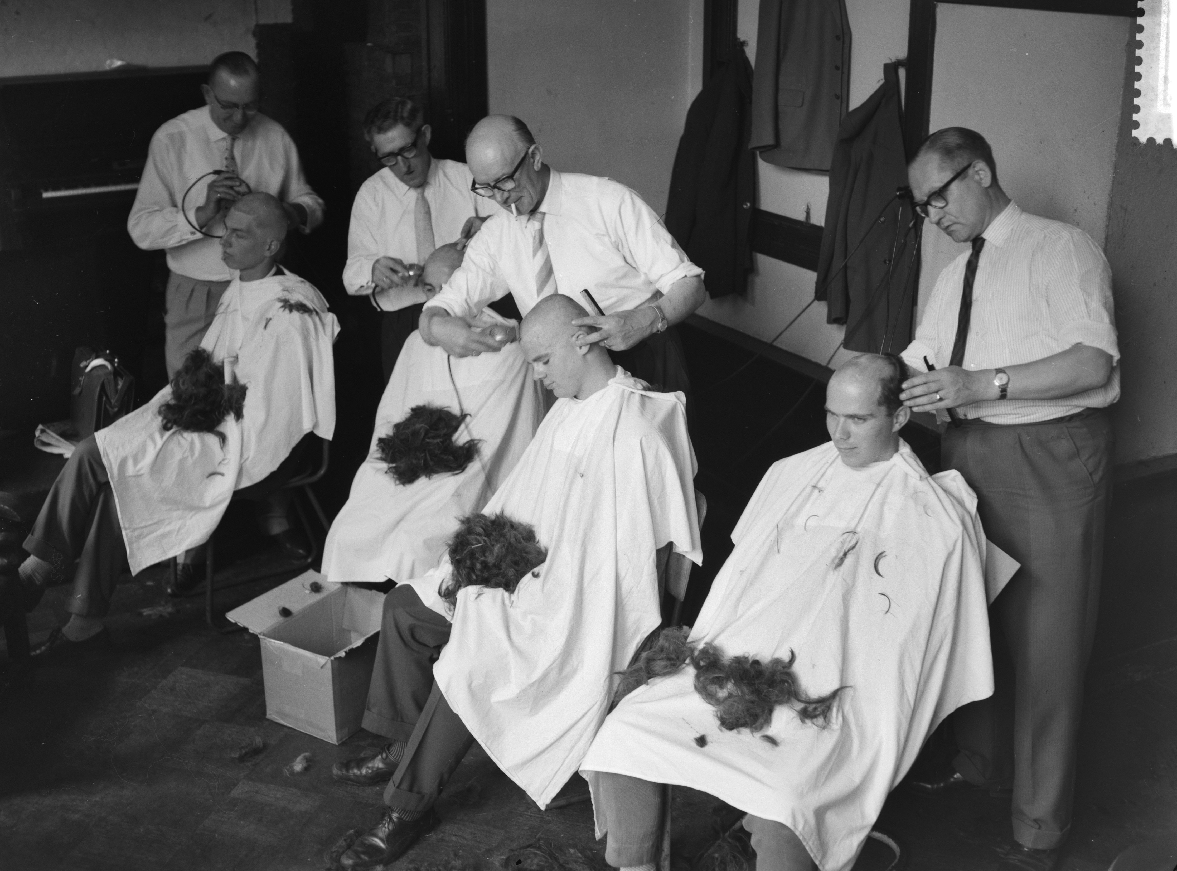 Collectie / Archief : Fotocollectie Anefo Reportage / Serie : [ onbekend ] Beschrijving : Ontgroenen van studenten. Kaalknippen groenen Datum : 12 september 1961 Trefwoorden : ONTGROENINGEN, STUDENTEN, scheren Fotograaf : Rossem, Wim van / Anefo Auteursrechthebbende : Nationaal Archief Materiaalsoort : Negatief (zwart/wit) Nummer archiefinventaris : bekijk toegang 2.24.01.04 Bestanddeelnummer : 912-9214